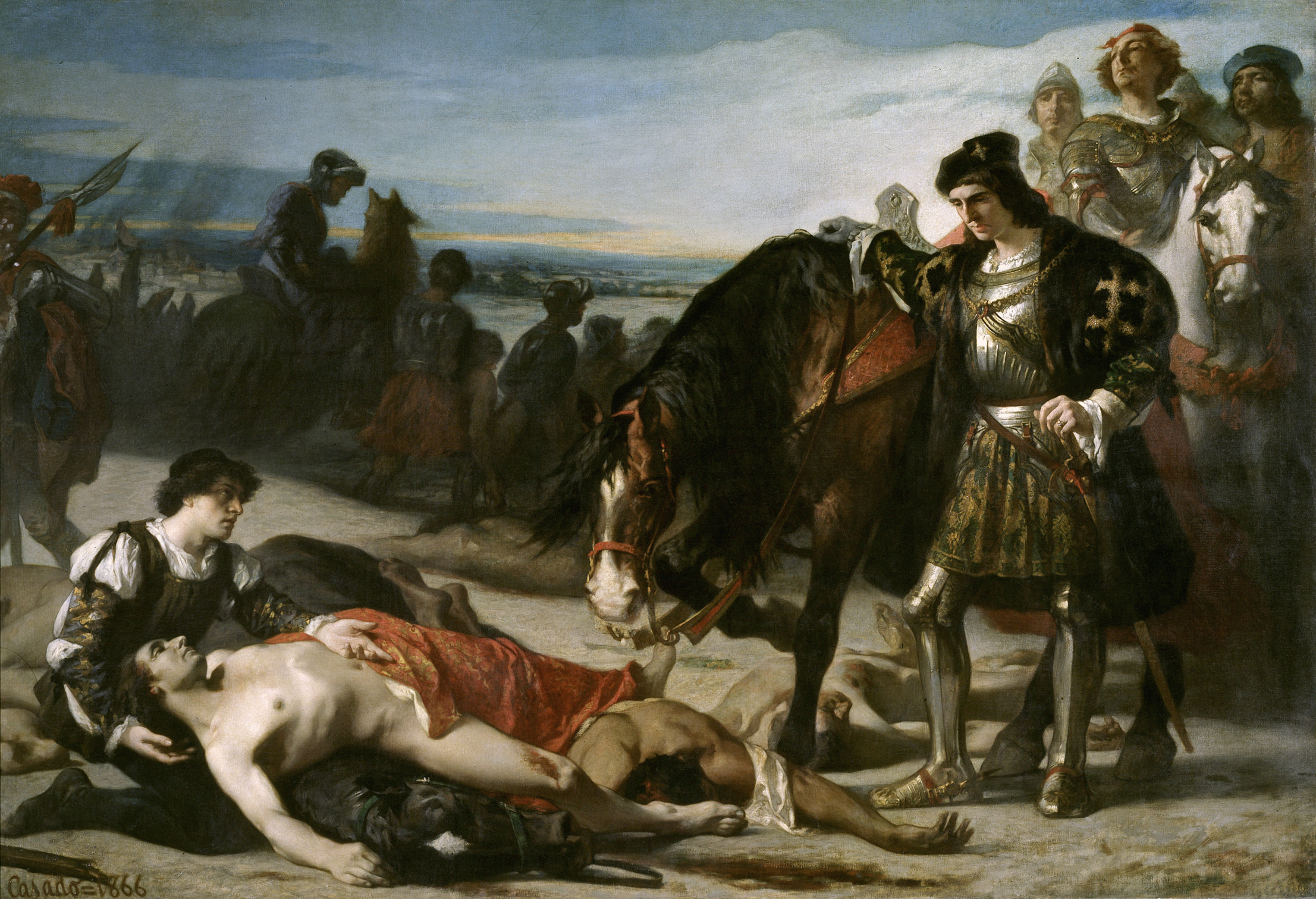 El lienzo muestra a Gonzalo Fernández de Córdoba, apodado "el Gran Capitan", contemplando el cadaver de Luis de Armagnac, duque de Nemours, comandante del ejército francés en la batalla de Ceriñola y fallecido en el transcurso de la misma.